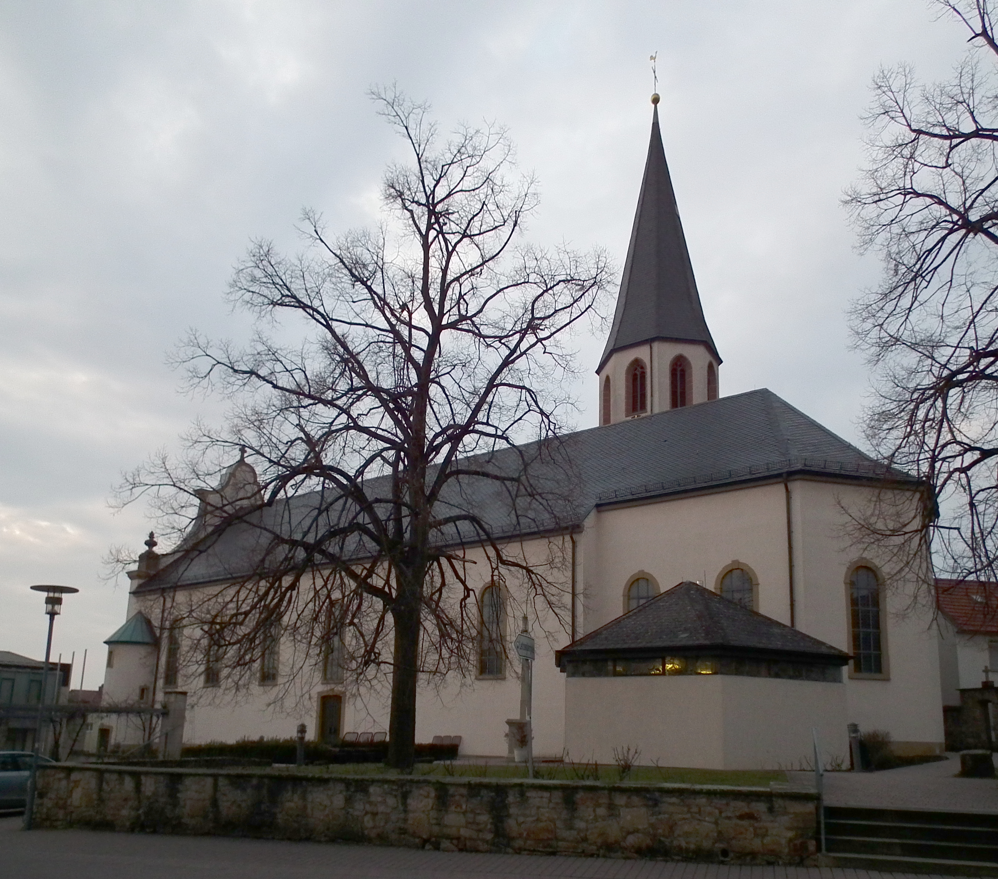 Katholische St.-Juliana-Kirche in Malsch (Rhein-Neckar-Kreis, Baden-Württemberg, Deutschland)